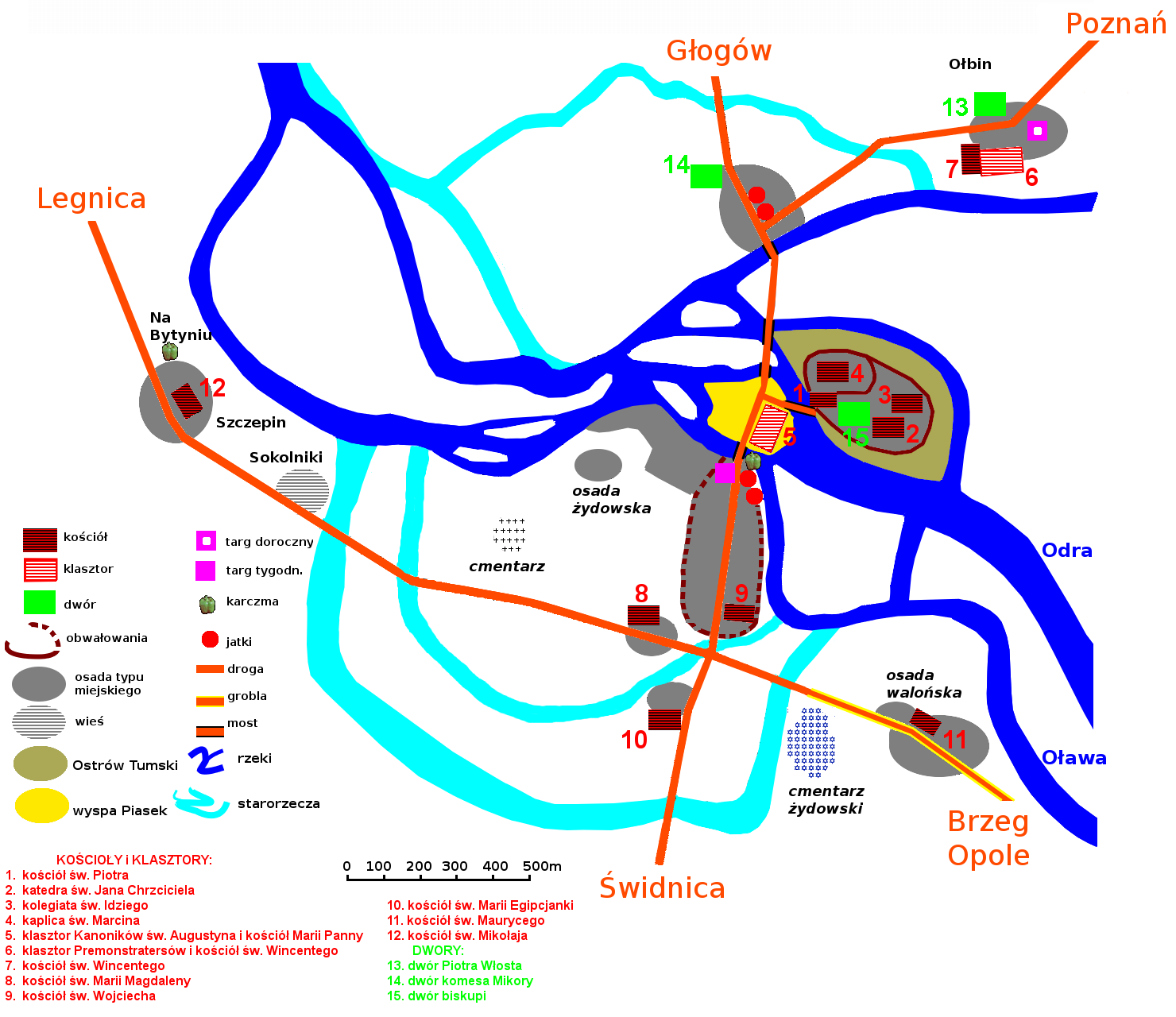 Średniowieczny Wrocław w XII-XIII wieku, mapa poglądowarysunek wg Encyklopedii Wrocławia (Wyd. Dolnośląskie 2000, ISBN 83-7023-749-5)